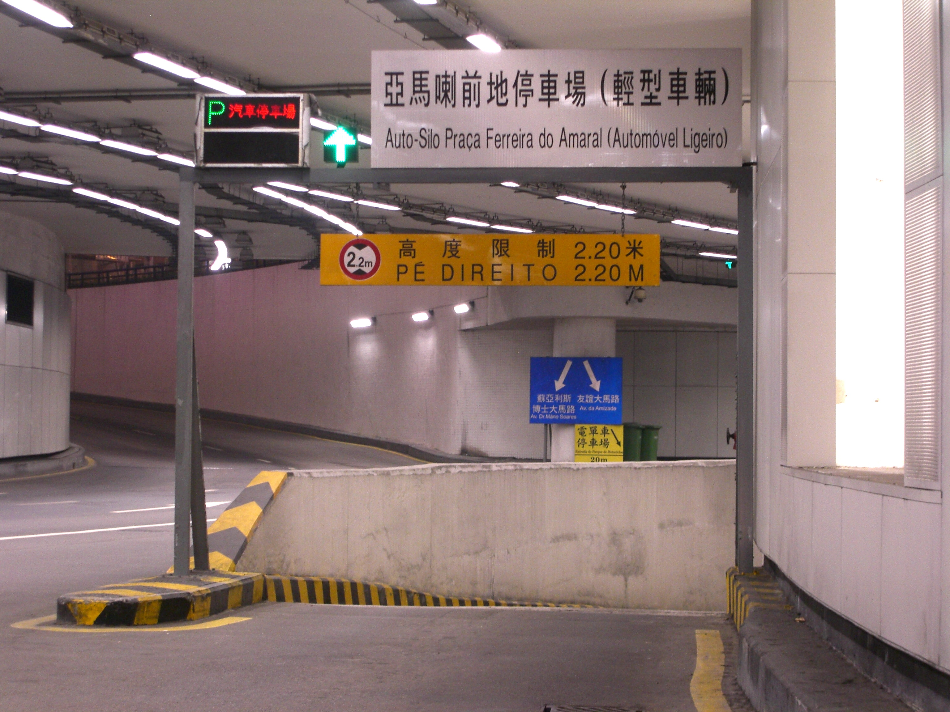 Auto Silo Praça de Ferreira do Amaral (Automóvel Ligeiro)